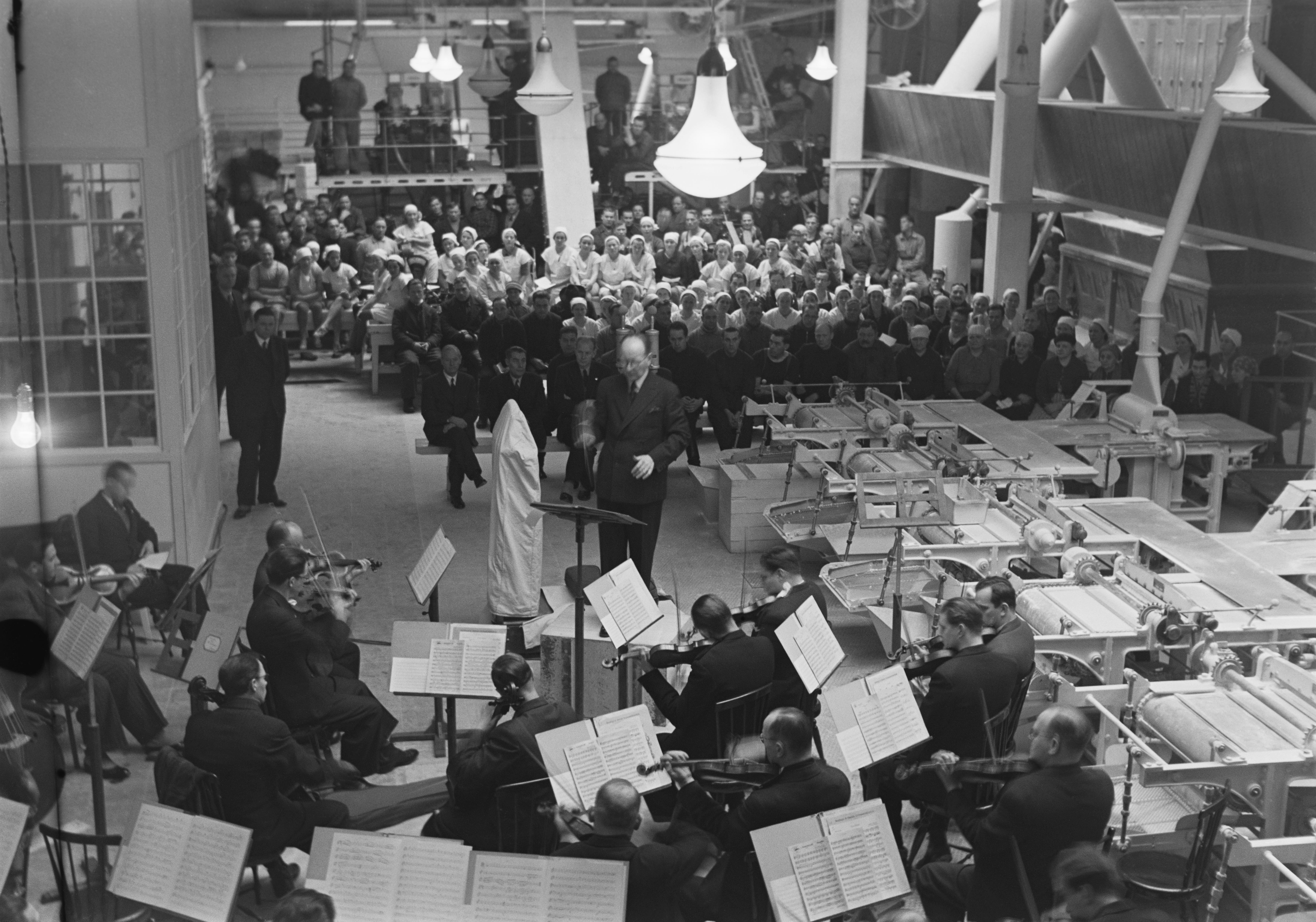 Radio-orkesterin konsertti Töölön sokeritehtaalla Helsingissä. Kapellimestari Toivo Haapanen johtaa orkesteria. Tiedätkö jotain tästä kuvasta? Jätä kommentti tai ota yhteyttä sähköpostitse: Tutustu Ylen arkistosisältöihin: Fler skatter från Yles arkiv: More about Yle, the Finnish Broadcasting Company